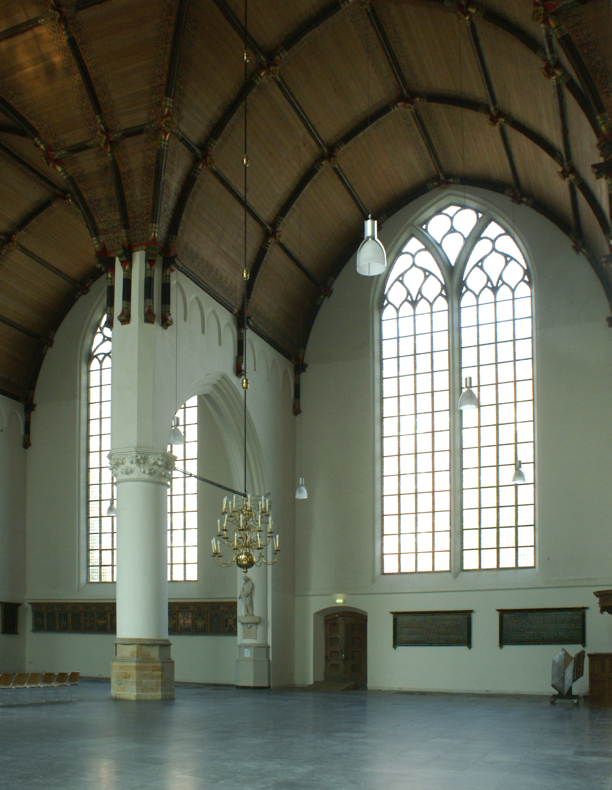 Kapellen aan de noordgevel van het schip